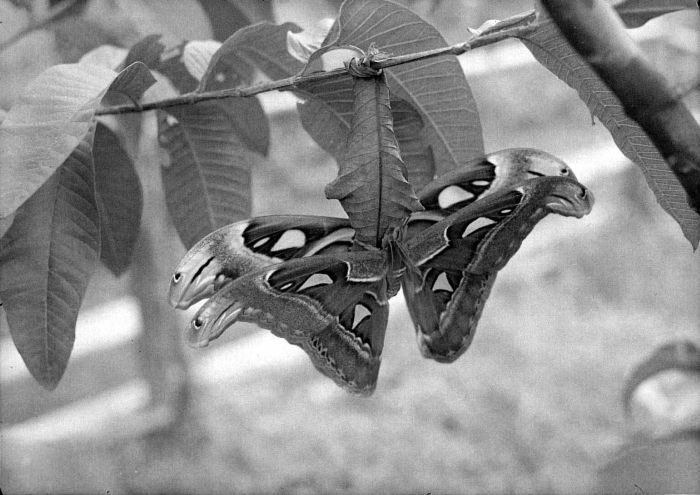 Repronegatief. Copulerende atlasvlinders